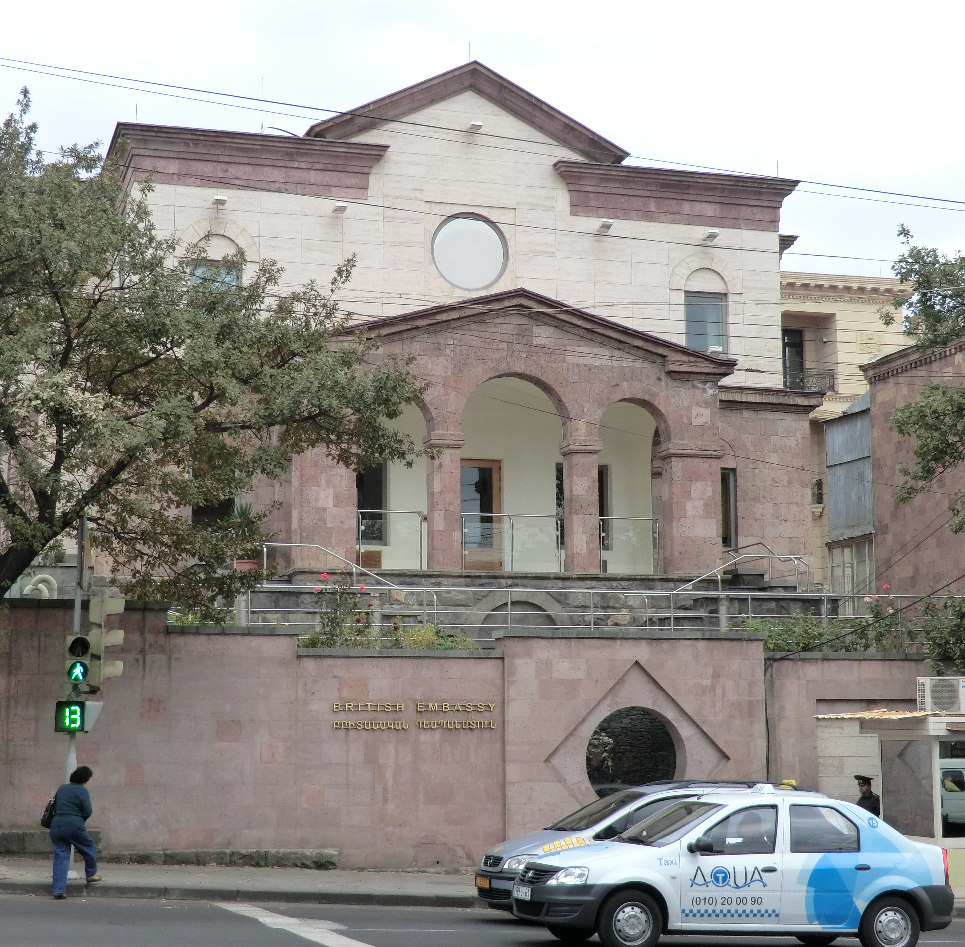 Ambassade du Royaume-Uni en Arménie.